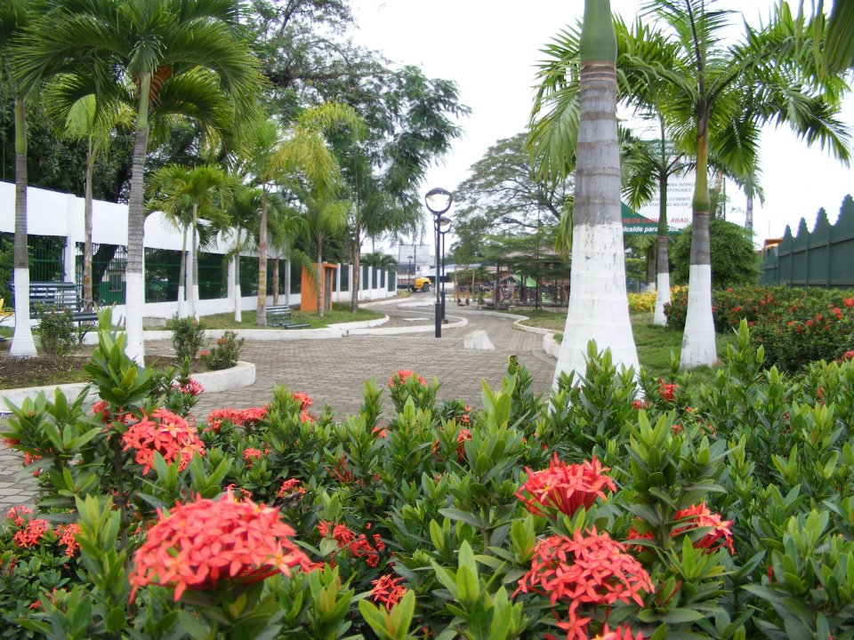 Ixora coccinea (red flowers) and Roystonia oleracea (palm) in Parque Lineal de Ventanas, Ecuador